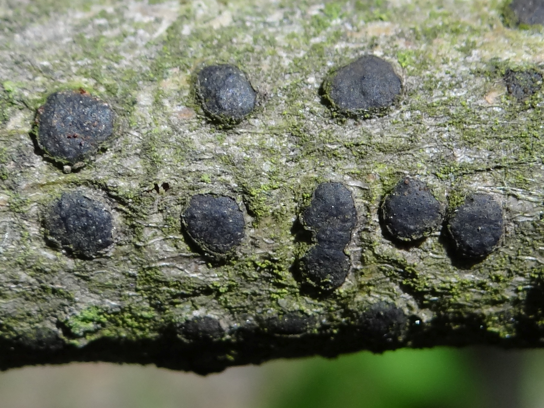 Diatrype bullata (location: Poland, Leszczyna (województwo małopolskie)